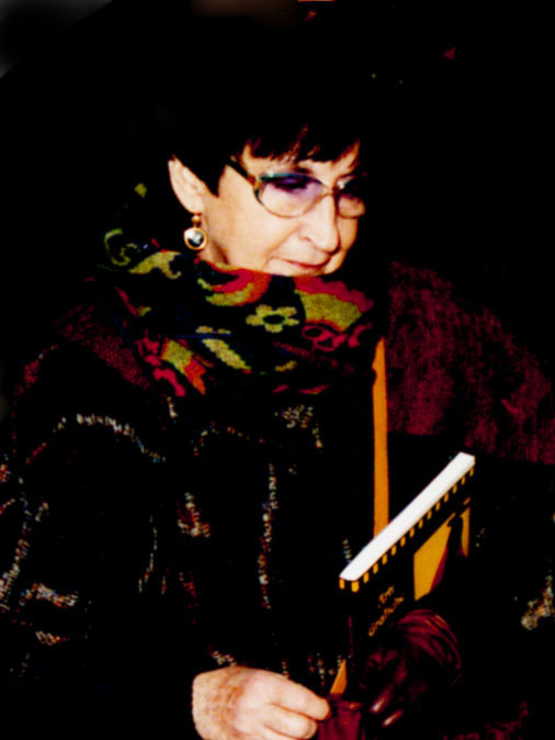 Lucia Mirisola